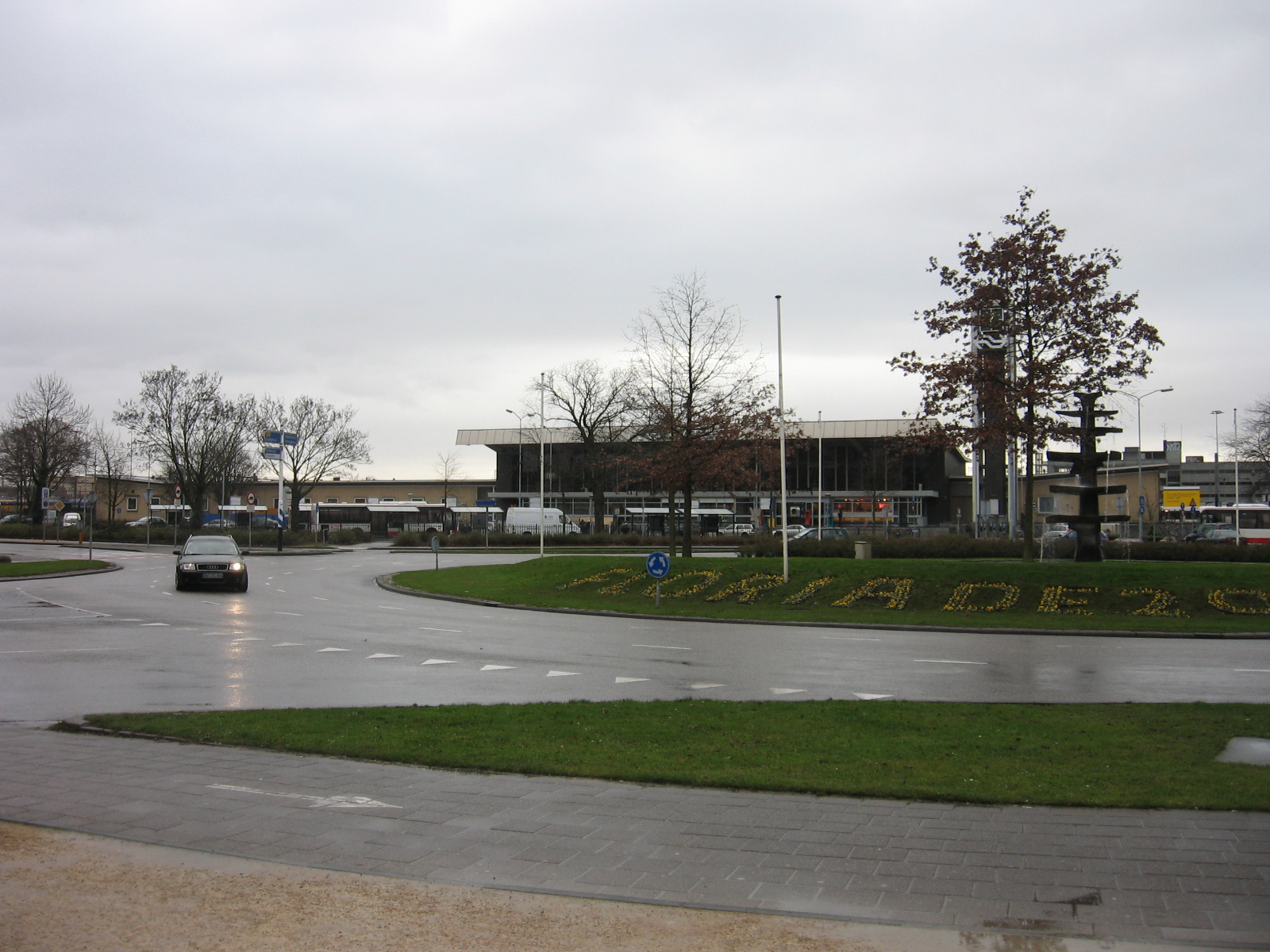 Venlo, Koninginneplein